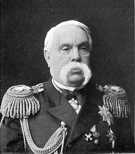 Адмирал русского императорского флота Пётр Васильевич Казакевич. Это изображение было также использовано для иллюстрирования статьи «Казакевич, Петр Васильевич» опубликованной в одиннадцатом томе «Военной энциклопедии», который был издан книгоиздательским товариществом И. Д. Сытина в 1913 году в столице Российской империи городе Санкт-Петербурге.